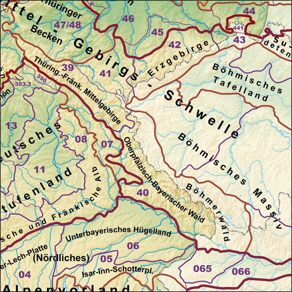 Haupteinheitengruppen der östlichen Mittelgebirge, u.a. mit Erzgebirge, Thüringer Wald, Fichtelgebirge und Bayerischem Wald.